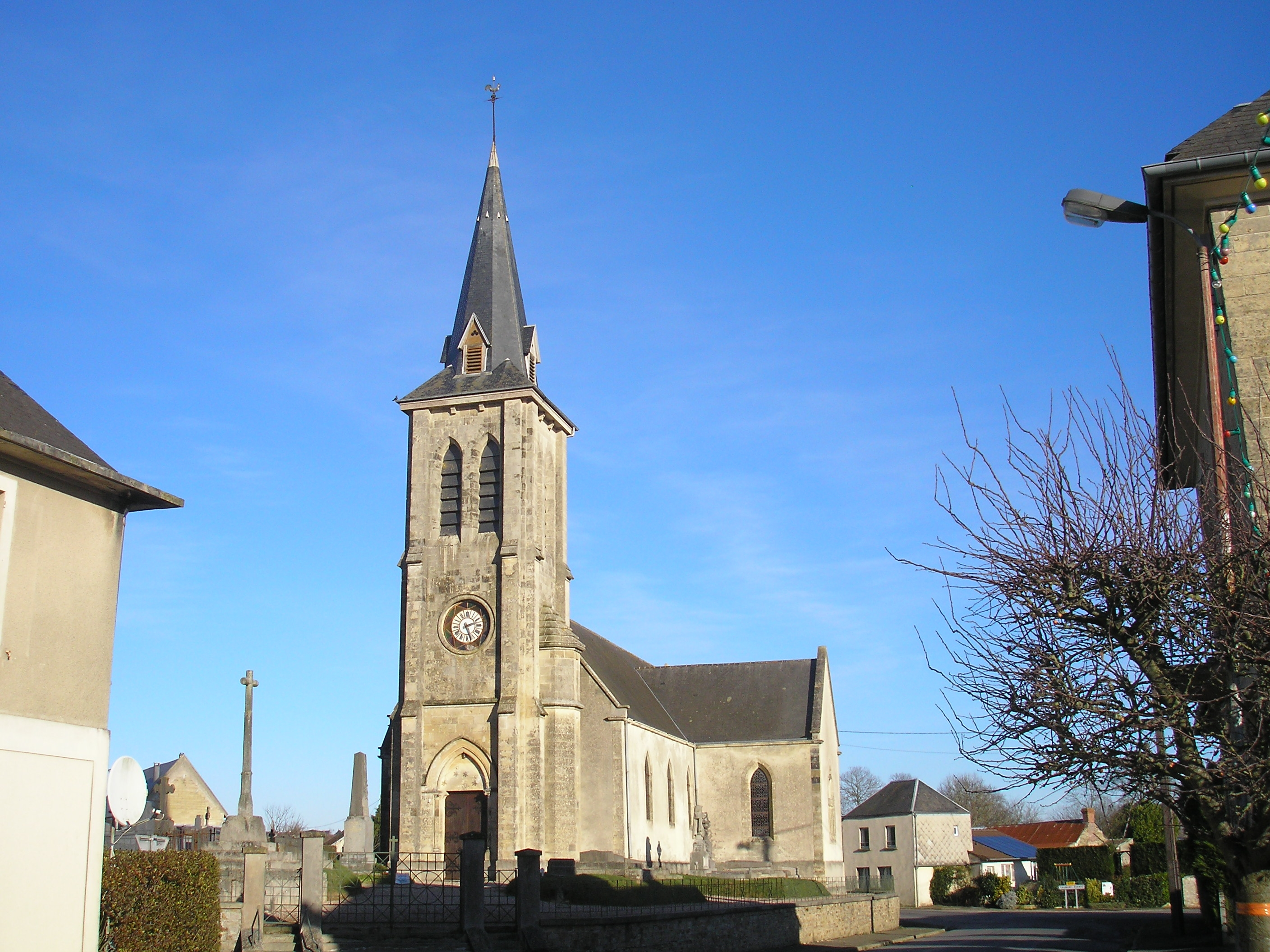 Sept-Vents (Normandie, France). L'église Notre-Dame.